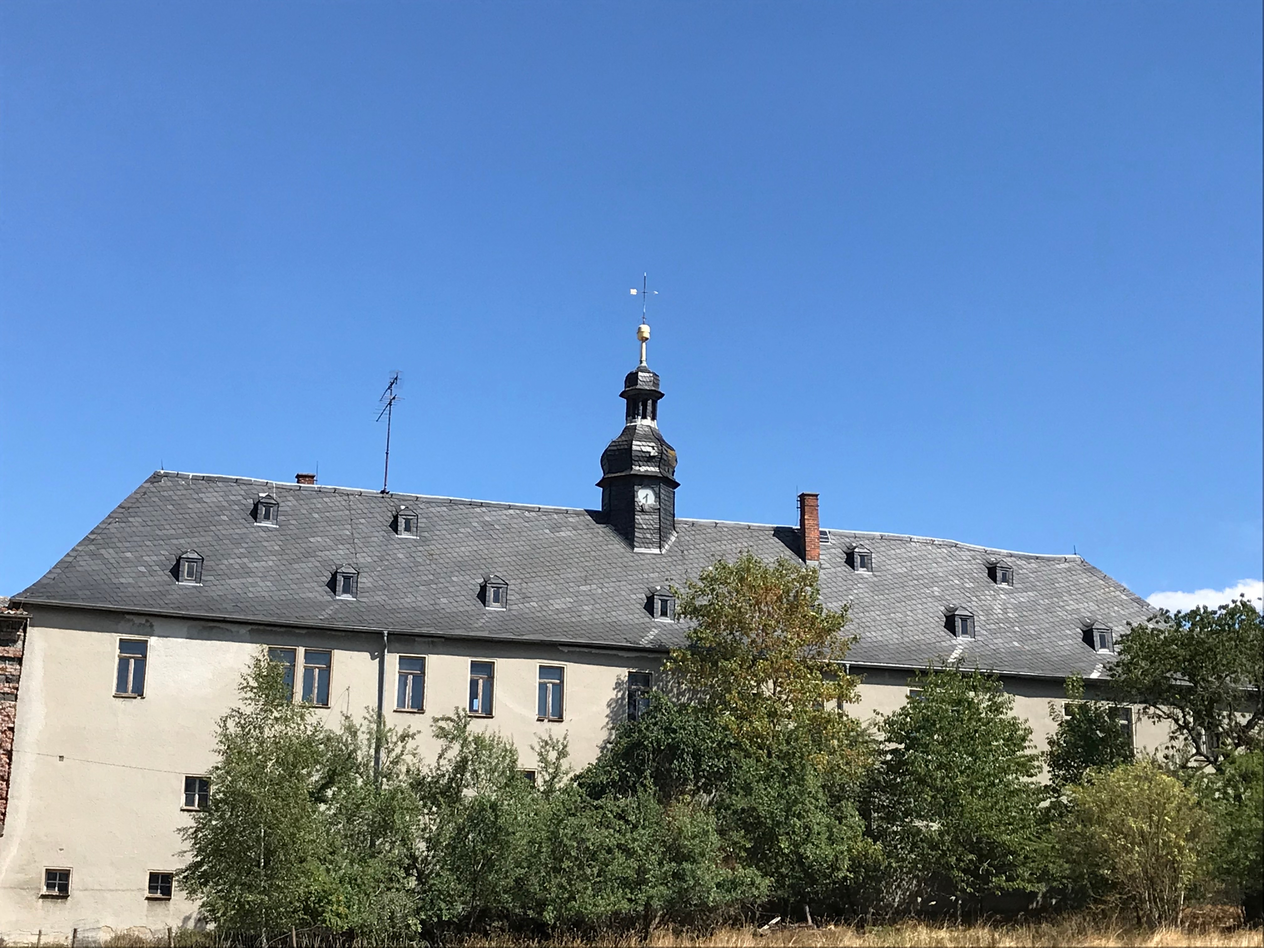 Rittergut Christgrün